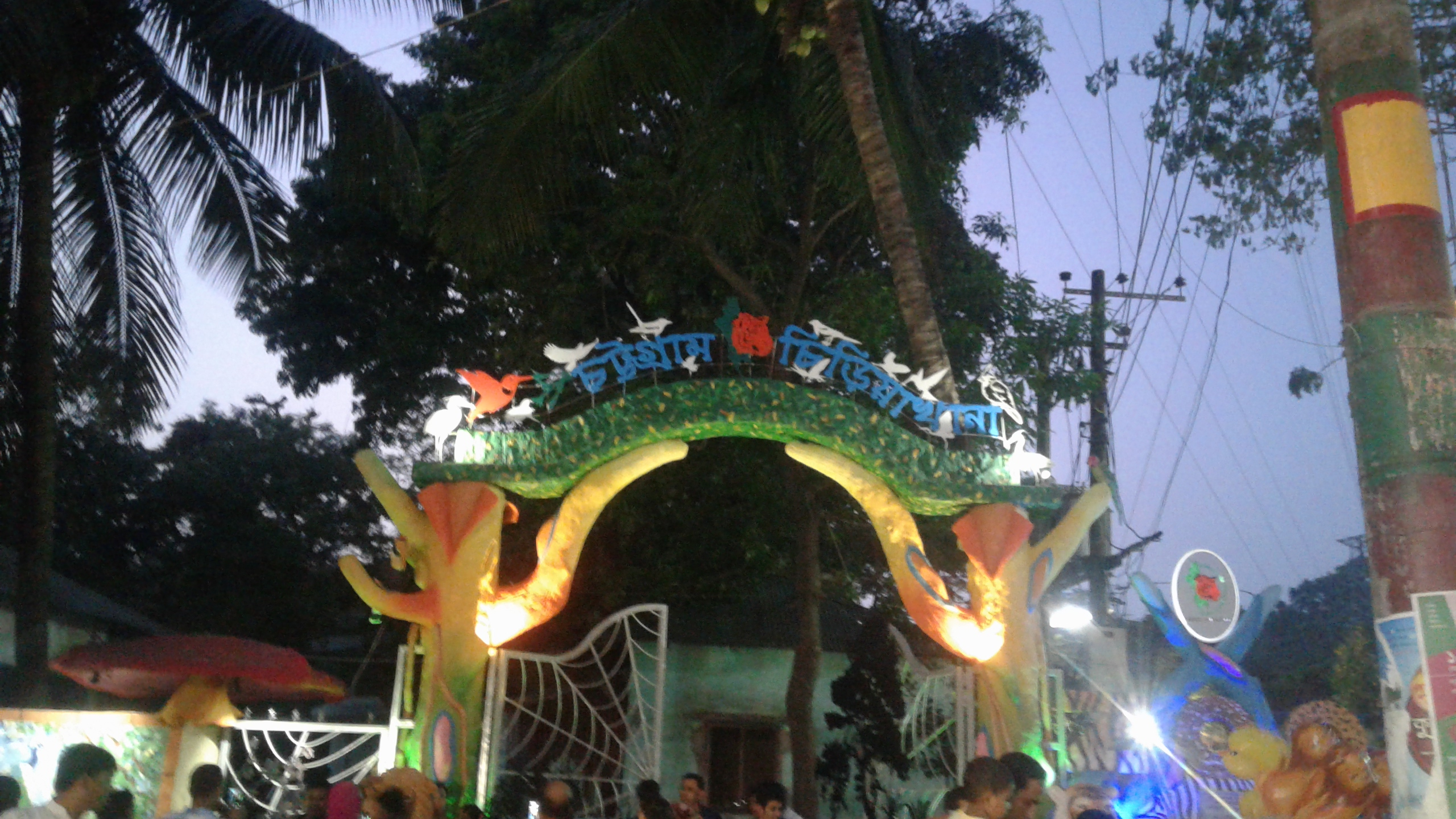 চট্টগ্রাম চিড়িয়াখানা